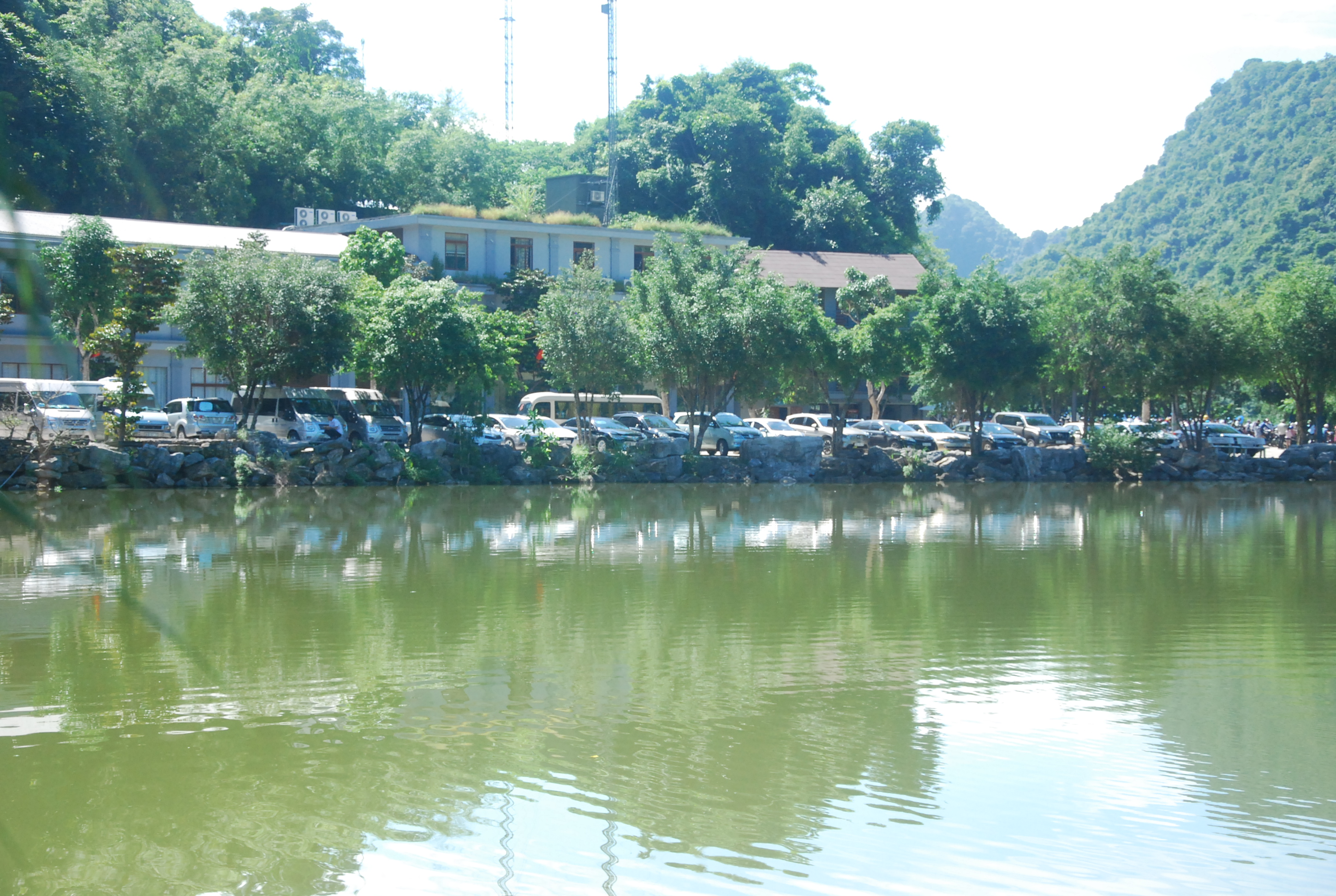 Phong cảnh Khu du lịch sinh thái Thung Nham ở Ninh Bình